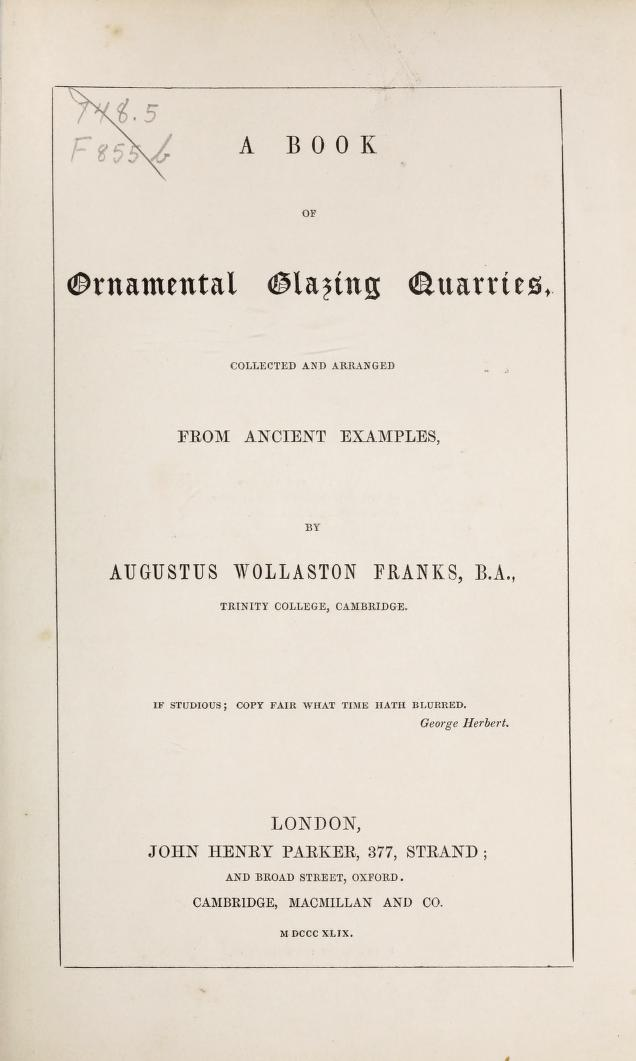 Augustus Wollaston Franks, Ornamental Glazing Quarries, Titelblatt (veröffentlicht 1849)